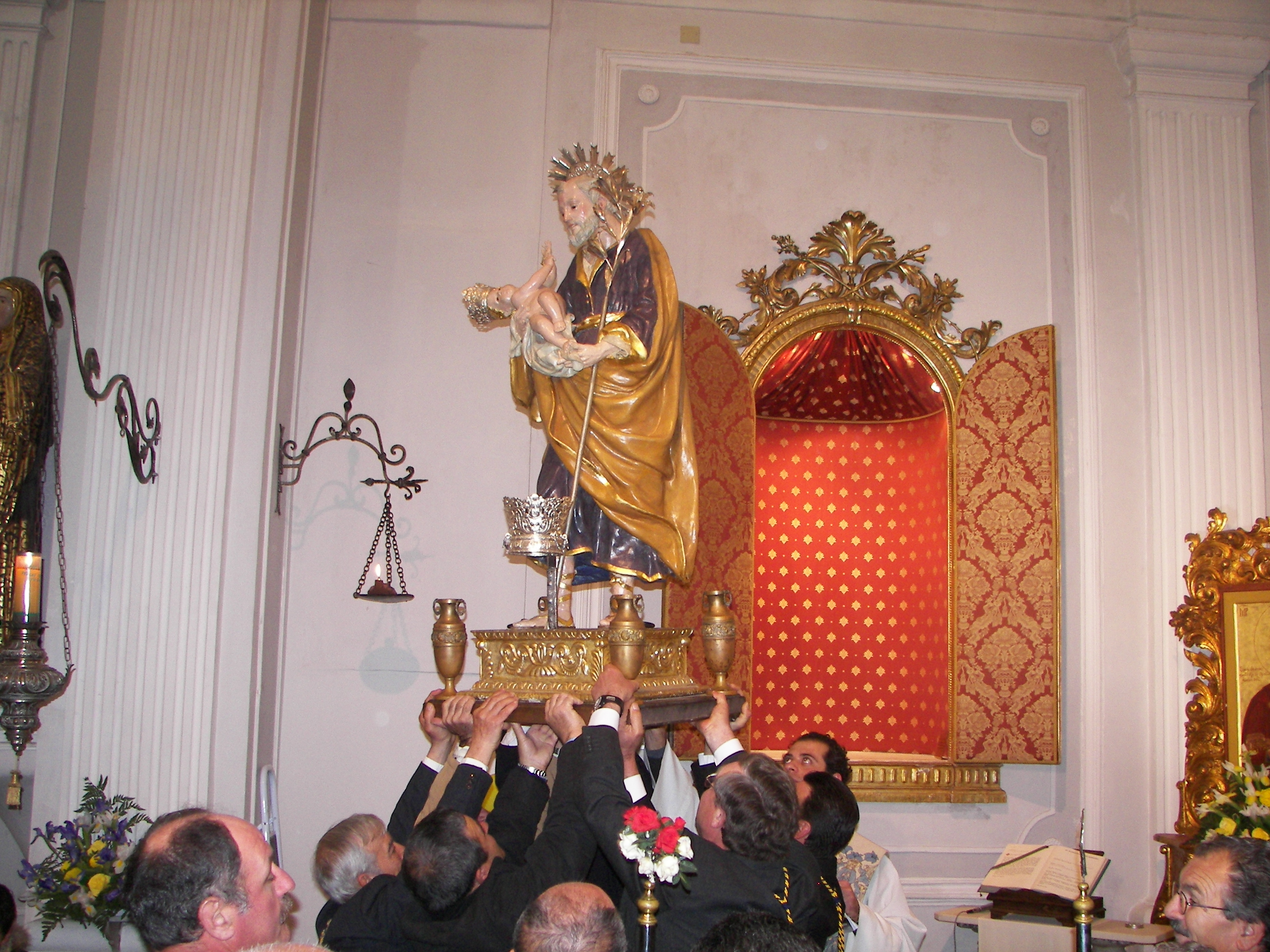 Rientro del Santo Patrono. Al termone della processione il Santo viene riportato nella sua cappella, dove viene celato fino alla festa futura.